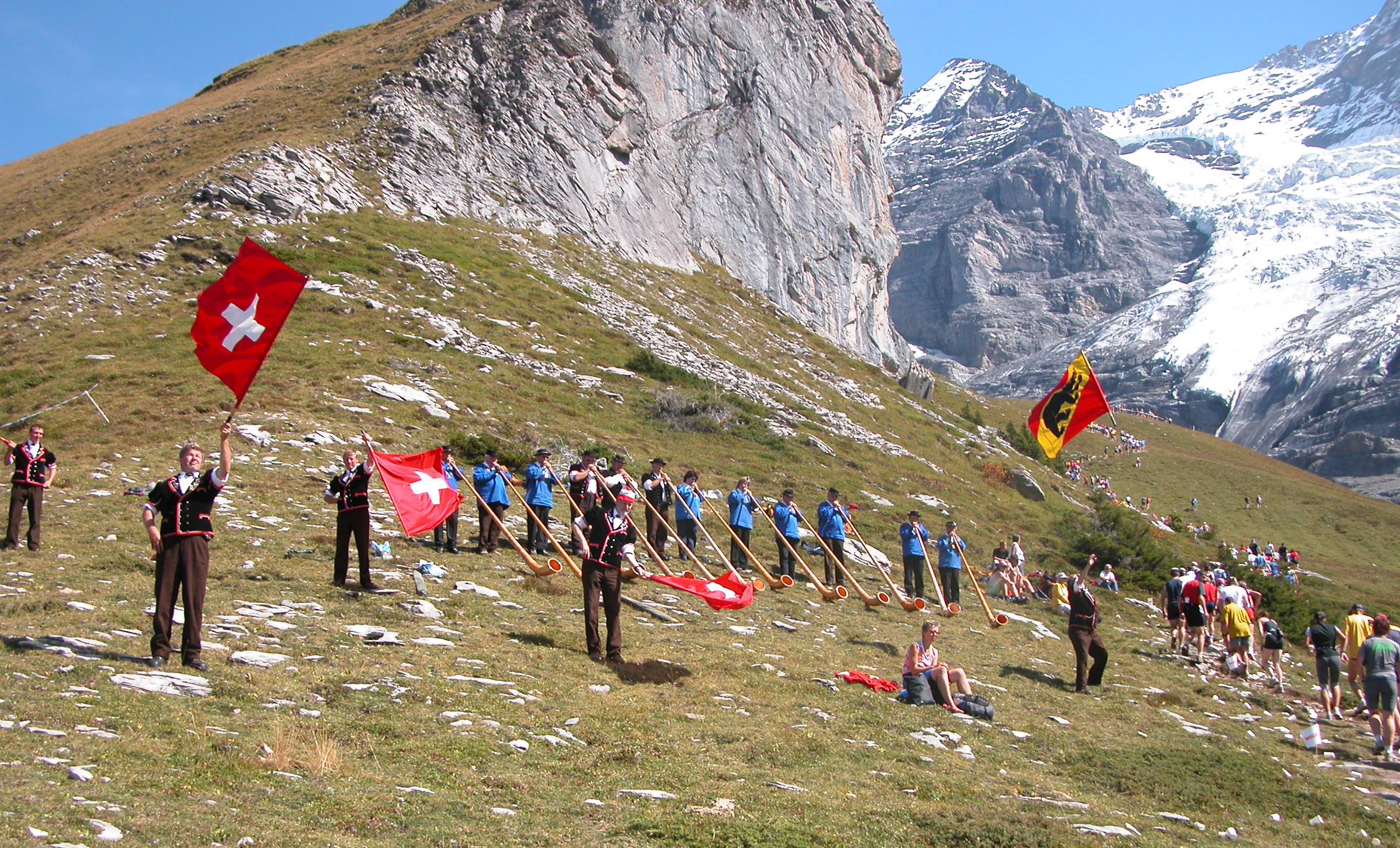 14. Jungfrau-Marathon am 09.09.2006